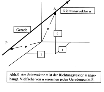 Stuetzvektor und Richtungsvektor einer Geraden